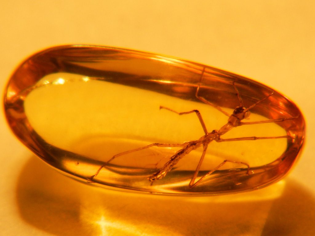 На научно-познавательной выставке натуральных янтарных инклюзов "Доисторические насекомые в янтаре"